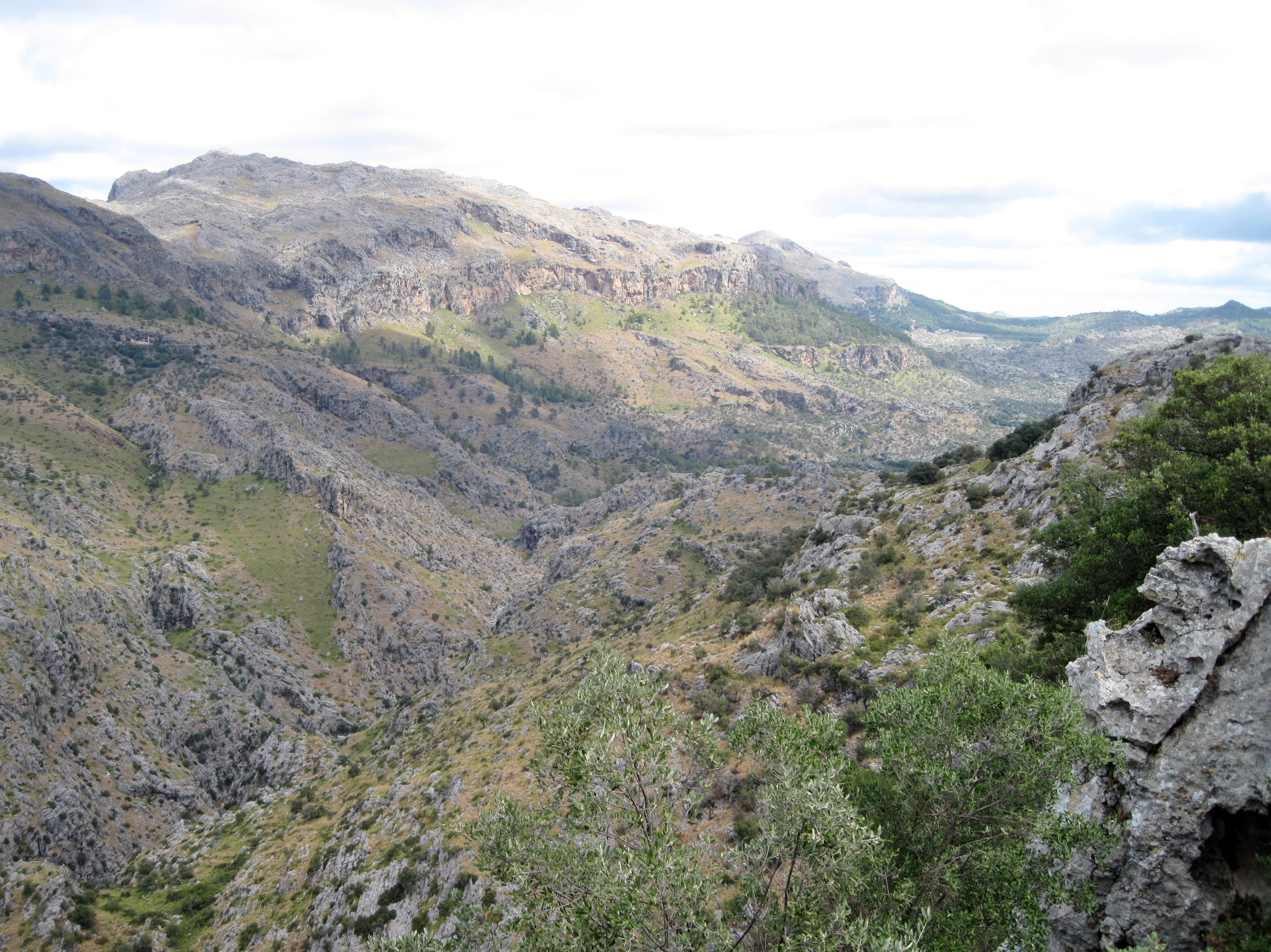 Blick auf den Torrent de Lluc, Gemeinde Escorca, Mallorca, Spanien